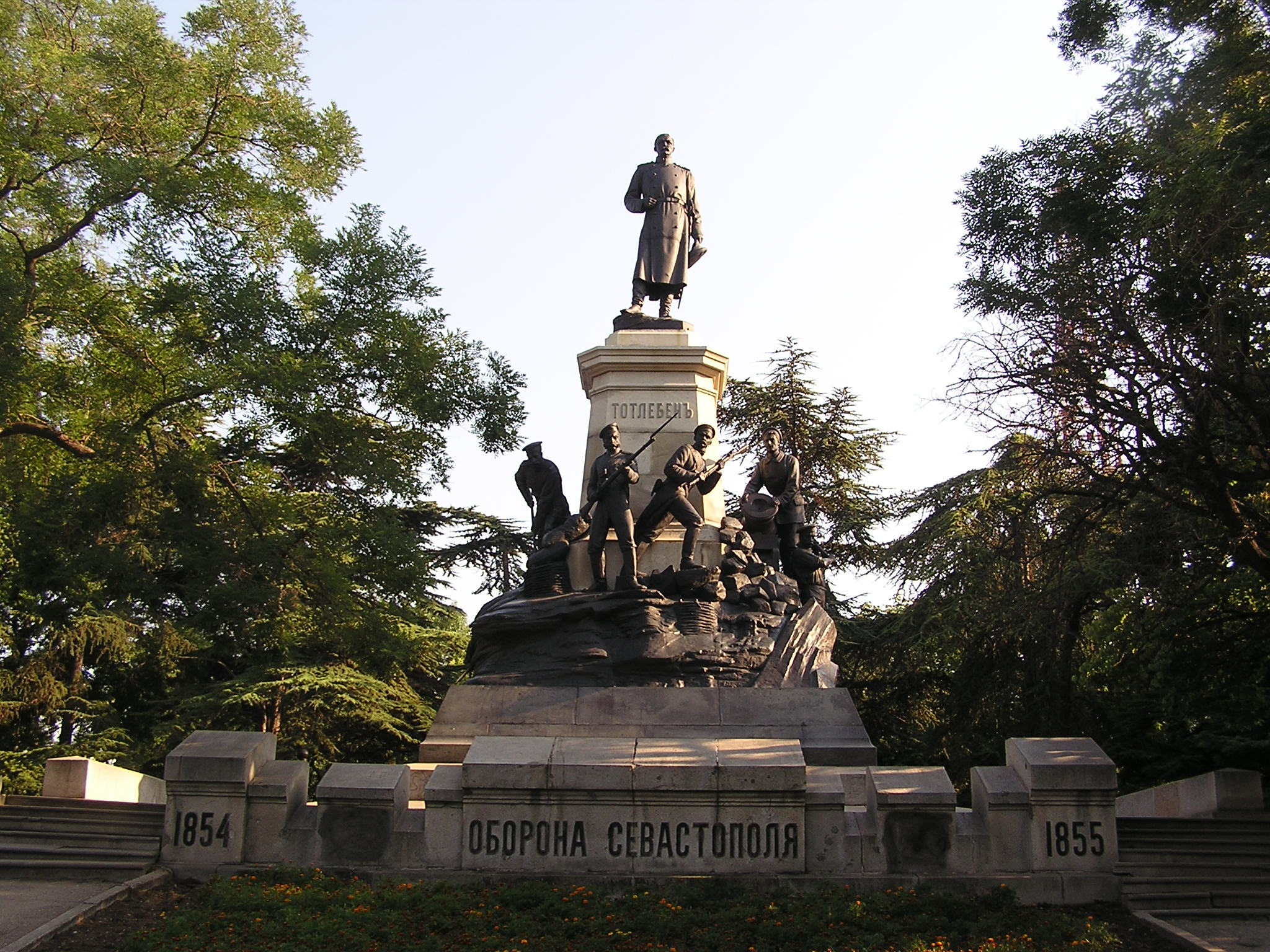 Севастополь. Памятник Тотлебену